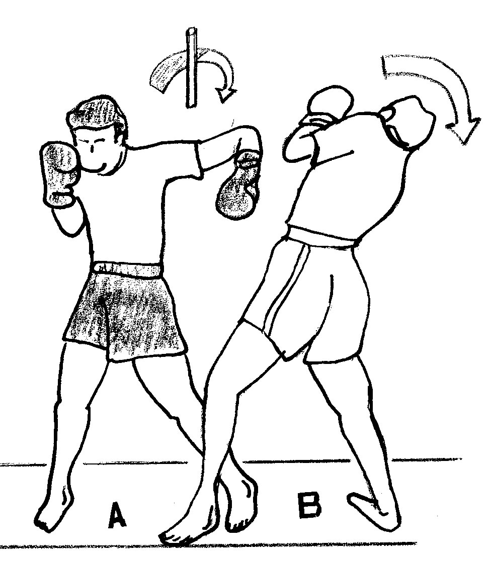 crochet1.jpg